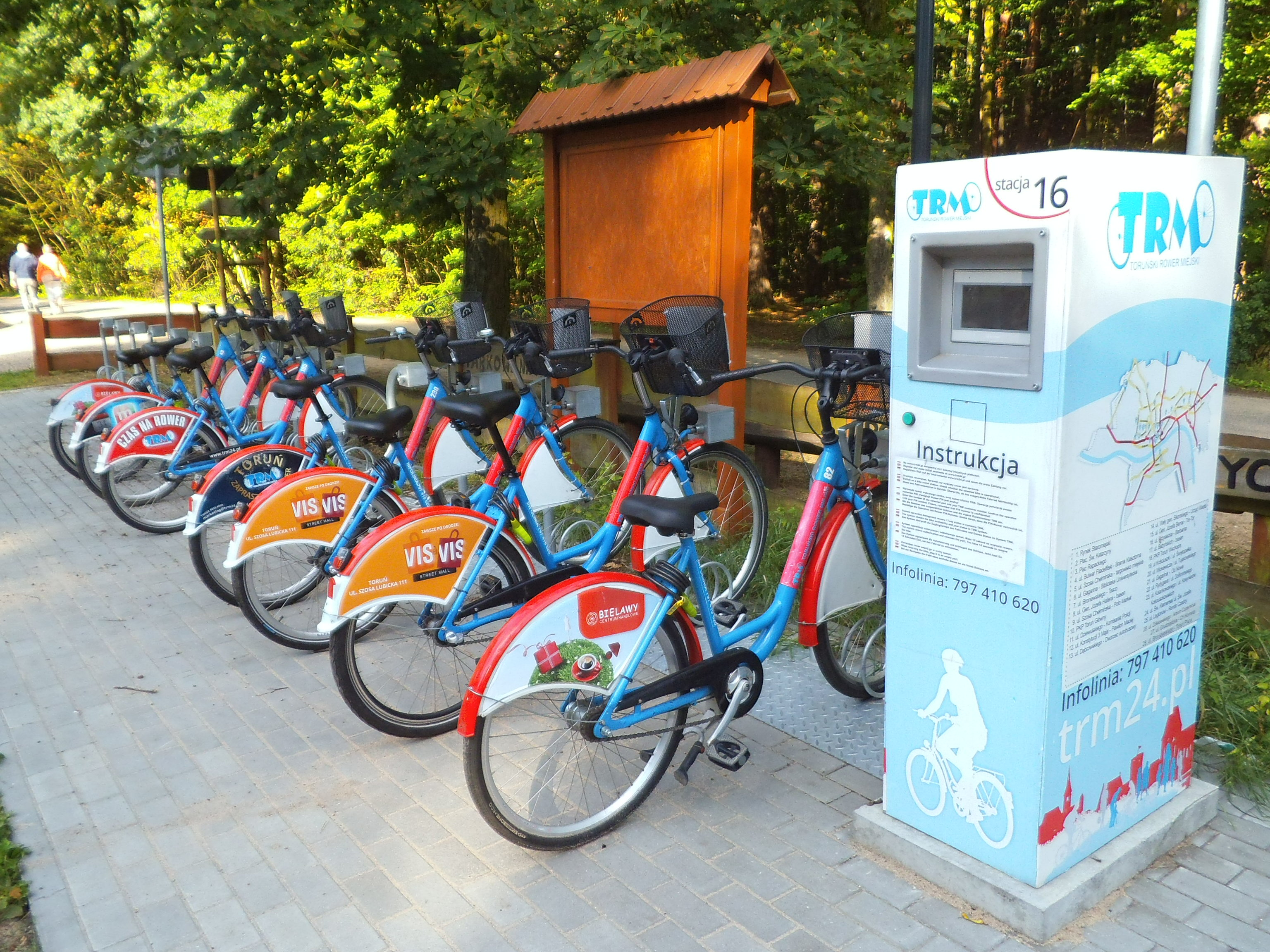 Stacja Toruńskiego Roweru Miejskiego na Barbarce